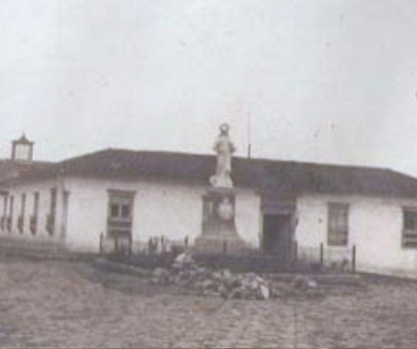 Nuestra Señora de las Misericordias. Santa Rosa de Osos, Antioquia. Colombia.